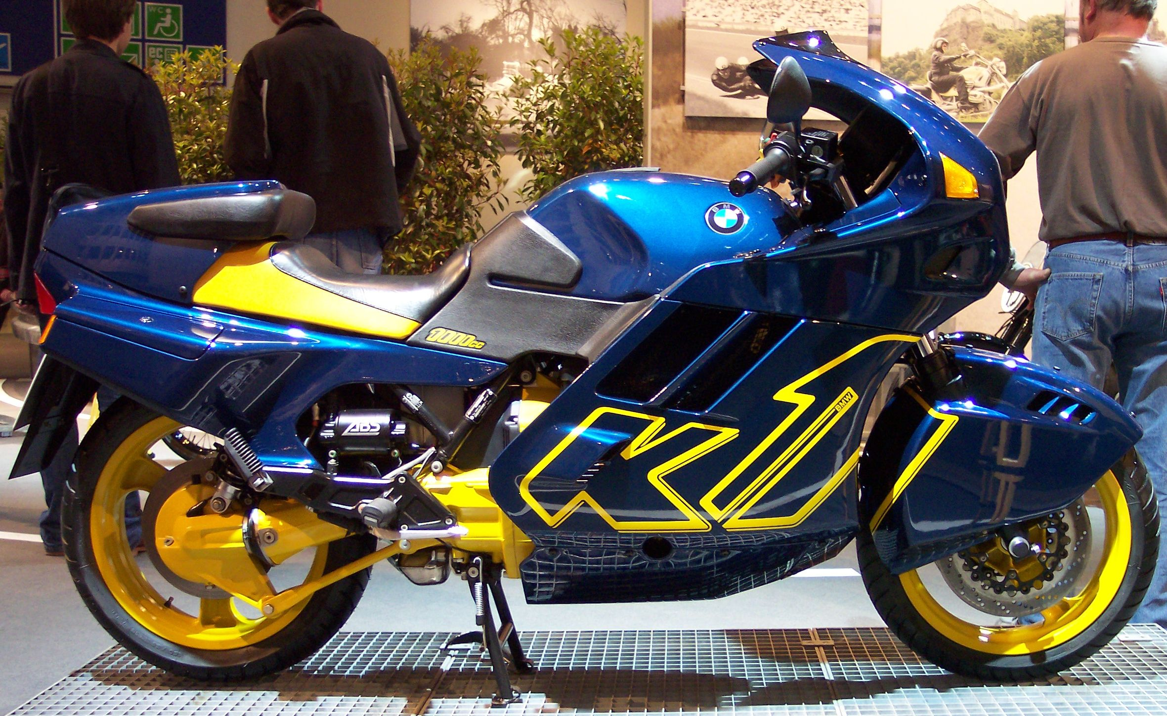 BMW K1 blue 1993